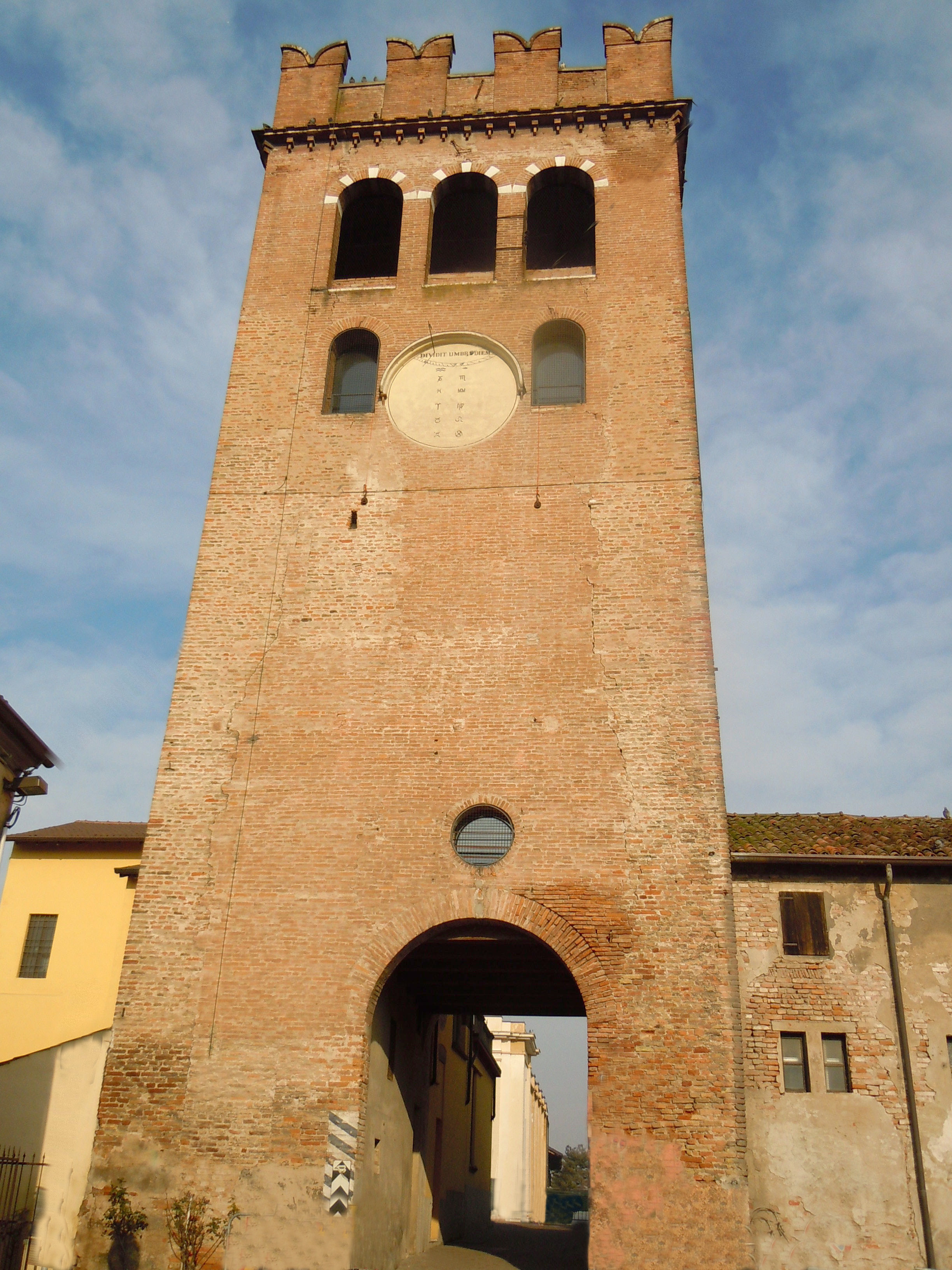 Castellucchio, torre castello.